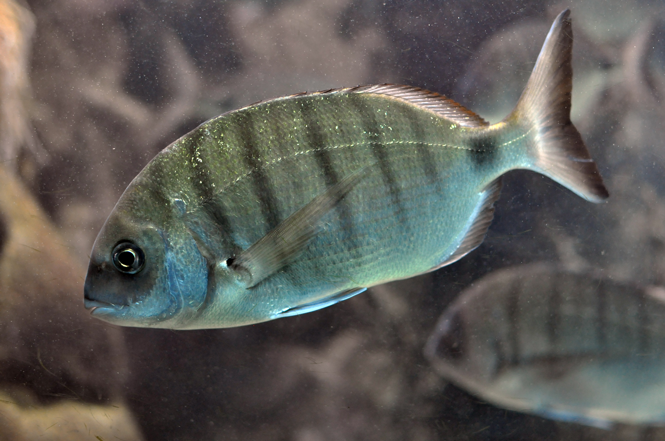 Diplodus sargus